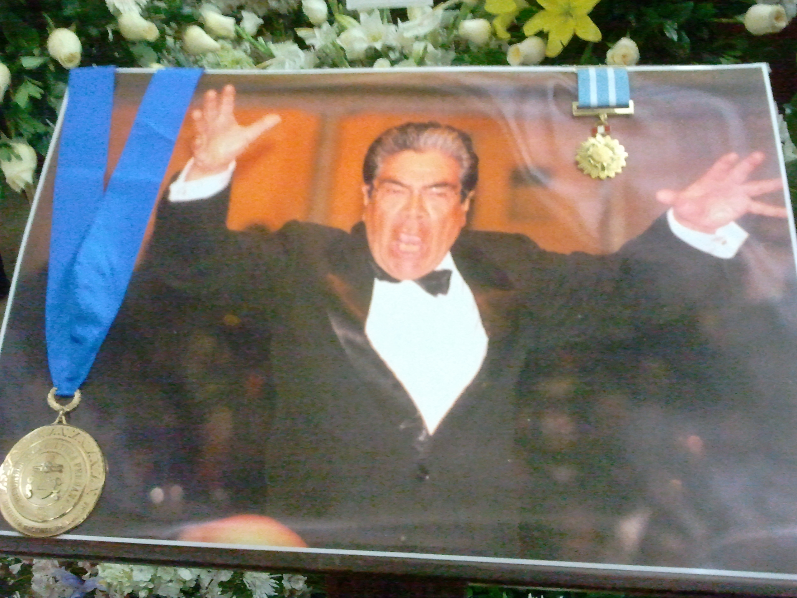 Foto di Leopoldo La Rosa dirigendo.